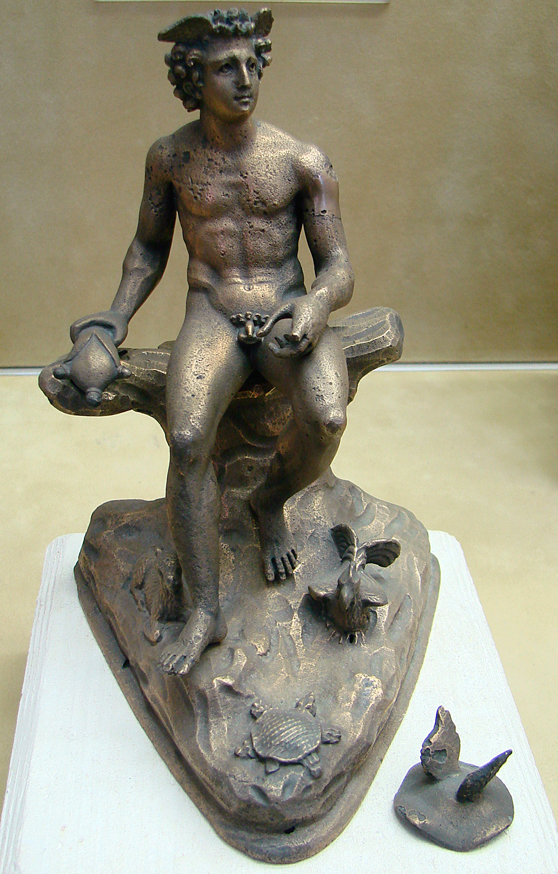 Statuette en bronze du dieu Mercure, trouvée en 1930 à Reims rue des Templiers. Musée Saint-Remi à Reims.